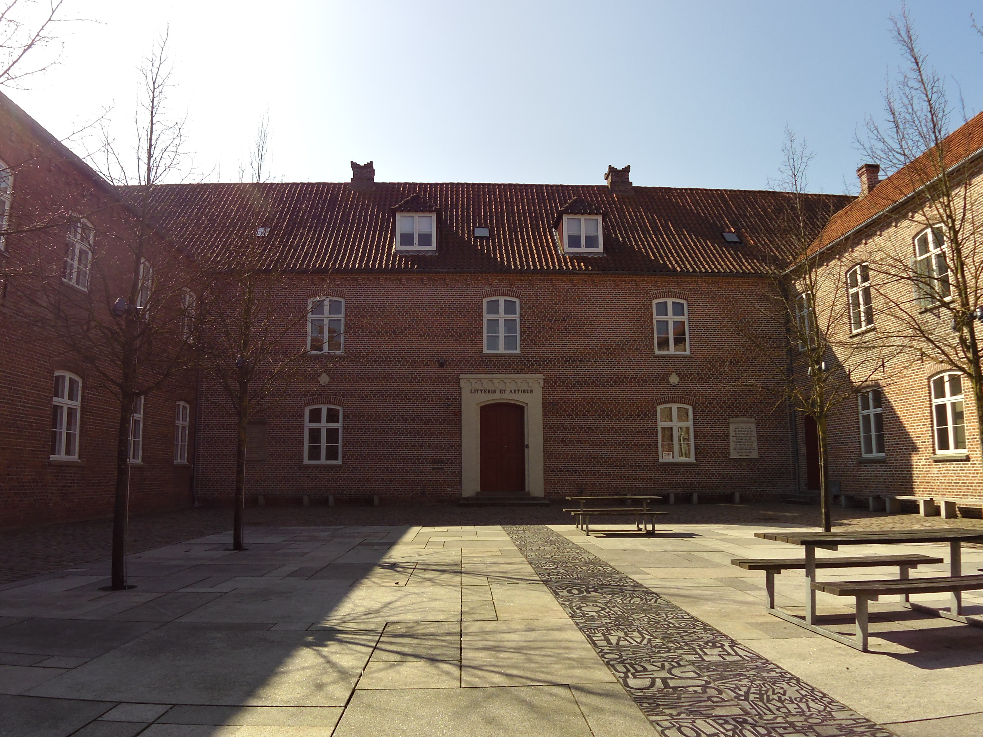 Katedralskolens gård